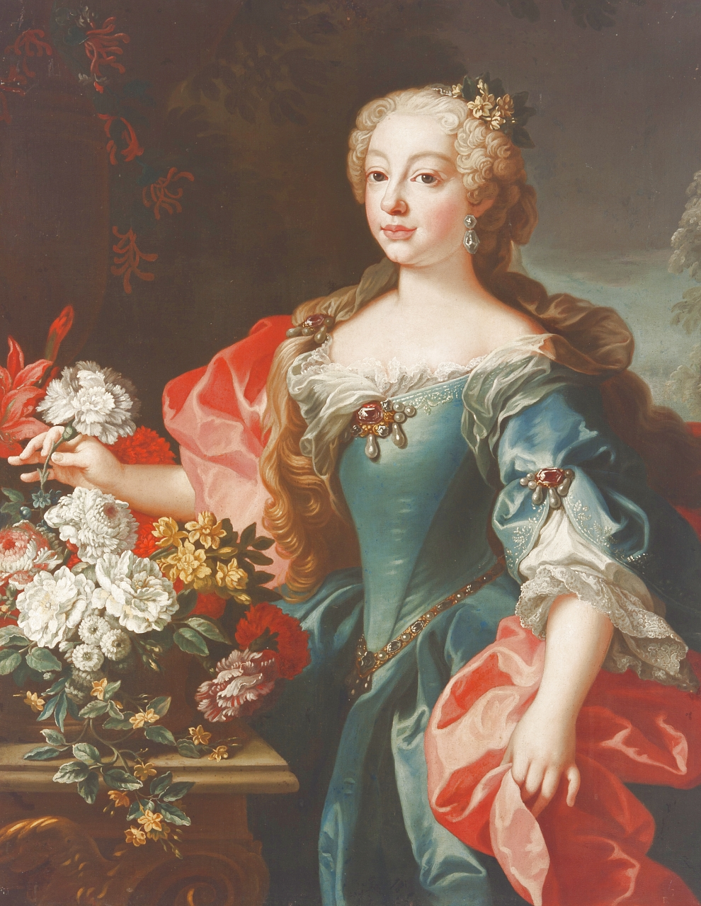 Marianna Vittoria di Borbone-Spagna (1718-1788), figlia di Filippo V e di Elisabetta Farnese, moglie dal 1729 di Giuseppe principe del Brasile e re del Portogallo